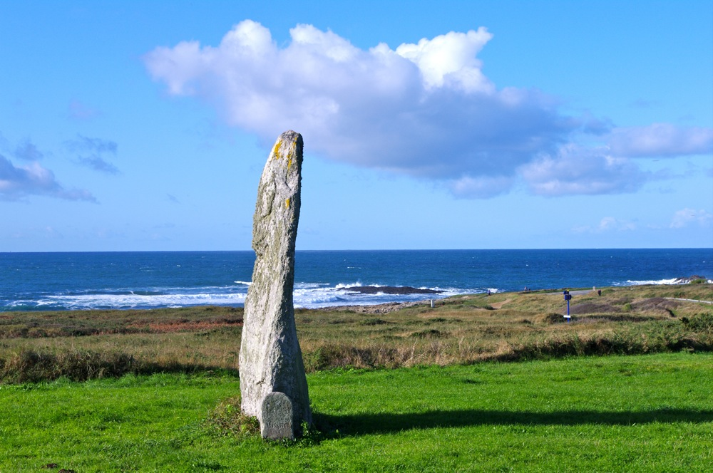 un menhir à Quiberon, sur la côte sauavage